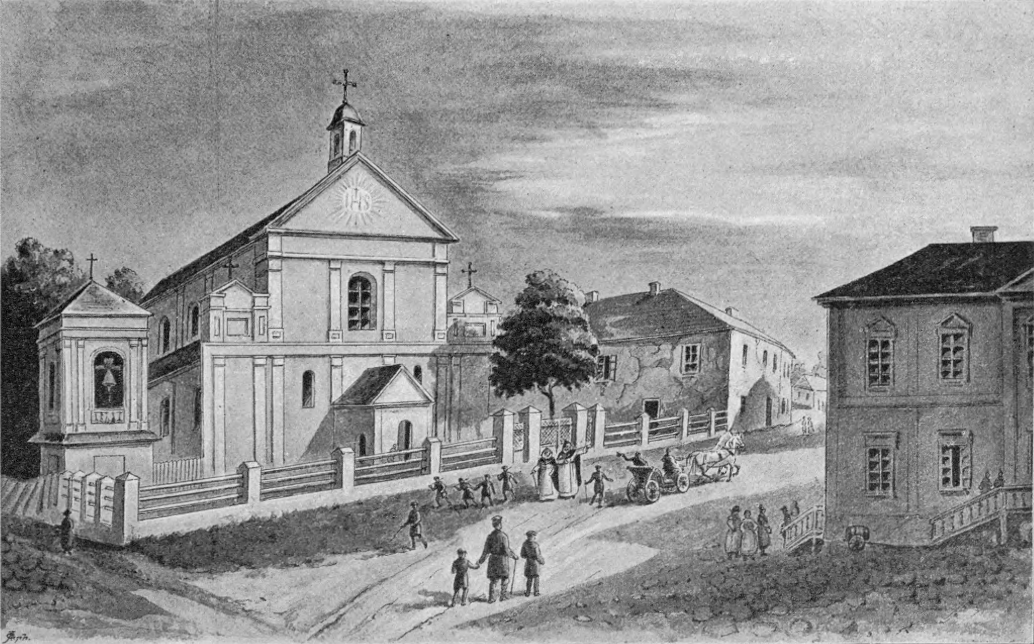 Беларуская (тарашкевіца): Наваградак (Navahradak), рог пляцу Рынку (plac Rynak) і вуліцы Слонімскай (vulica Słonimskaja). Касьцёл Сьвятога Міхала Арханёла і кляштар дамініканаў